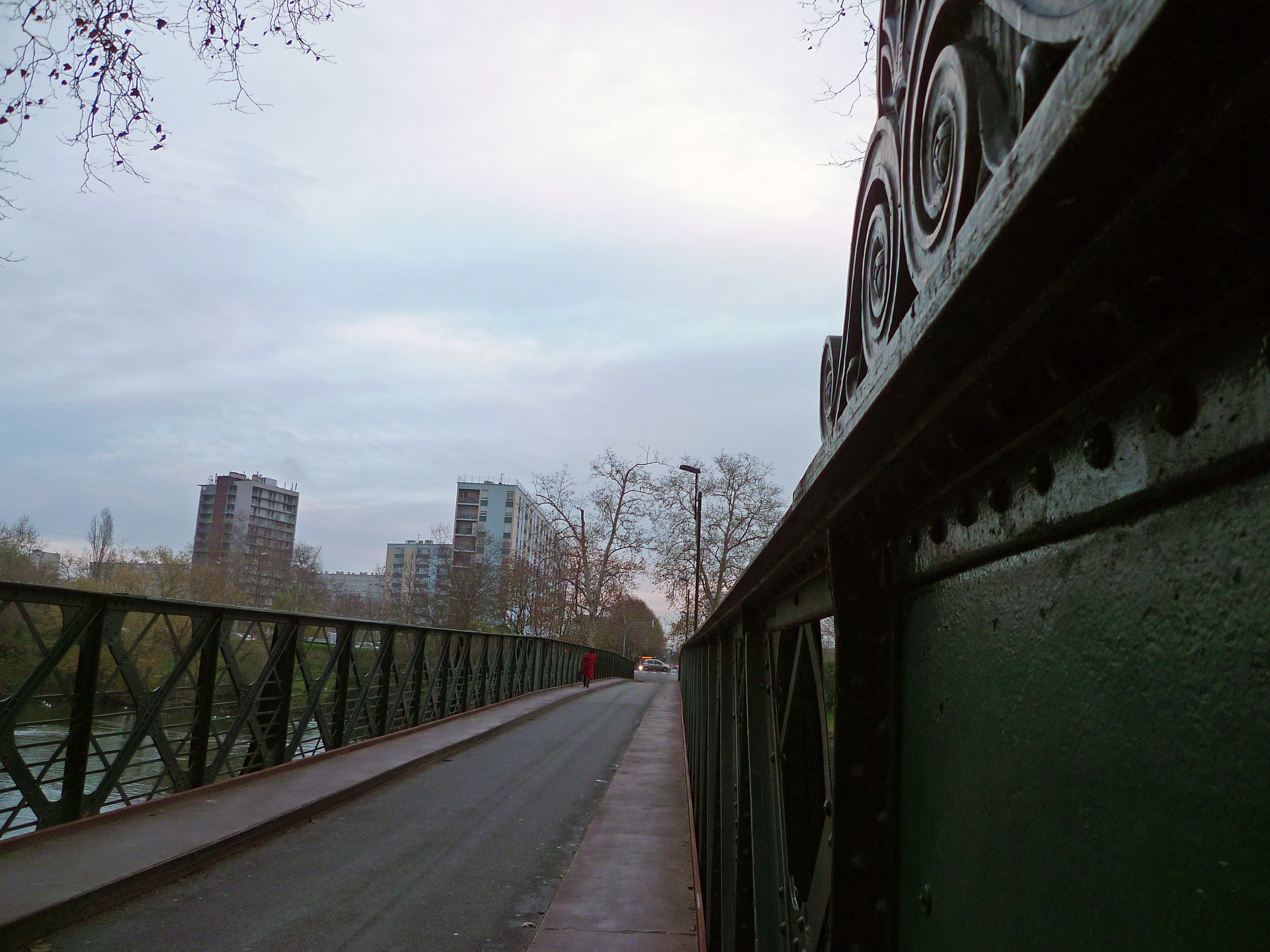 La passerelle de la Poudrerie et les immeubles d'Empalot depuis l'Île du Ramier à Toulouse (Haute-Garonne, France).